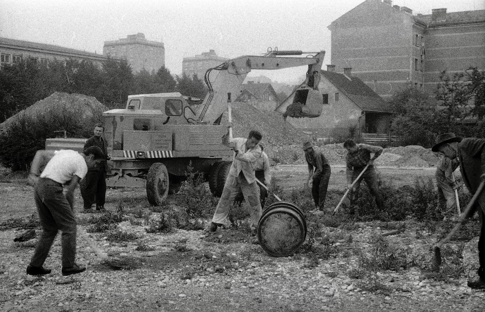 Na gradbišču kliničnega centra v Ljubljani.